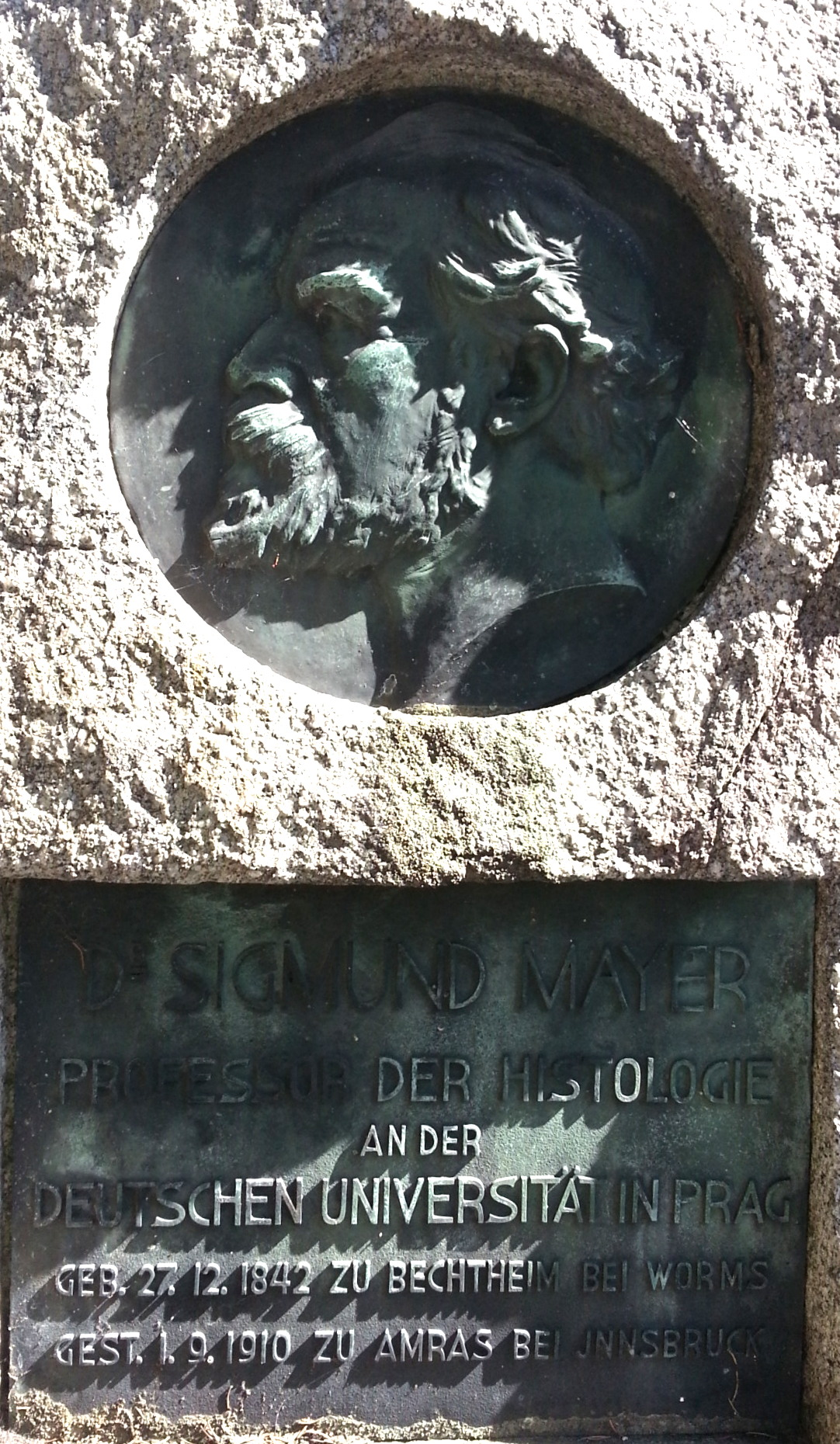 Professor Siegmund Mayer, Physiologe und Histologe